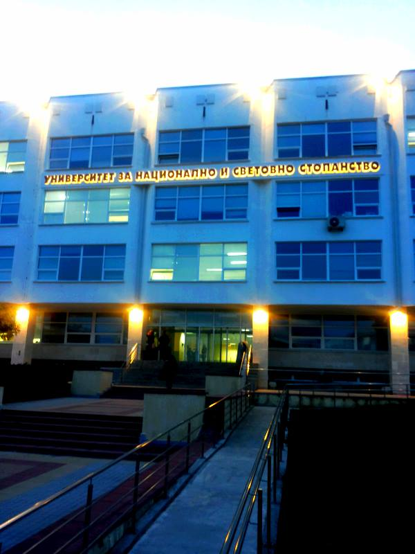 Новият корпус на УНСС